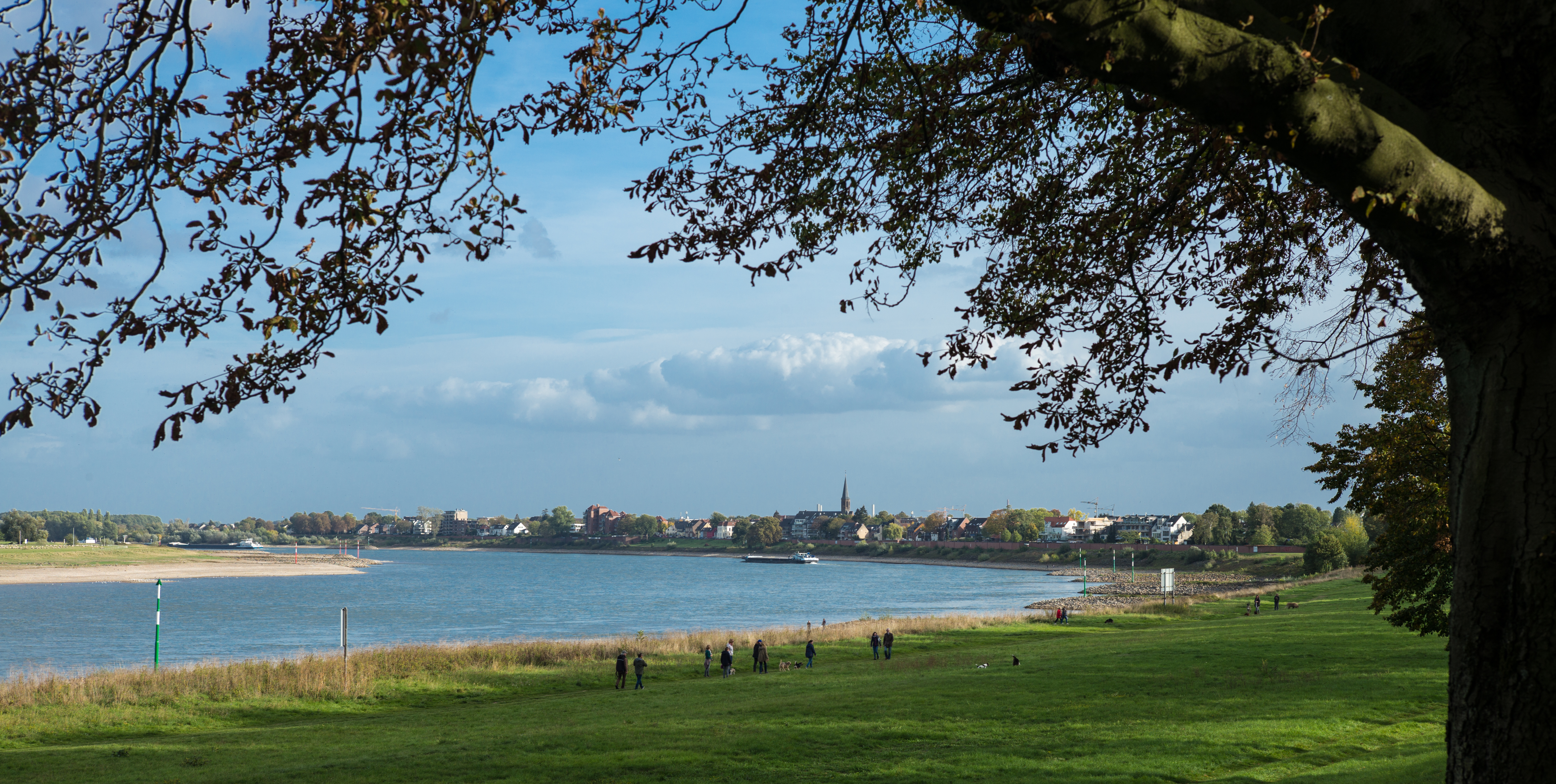 Grimlinghausen - Blick von den Rheinwiesen